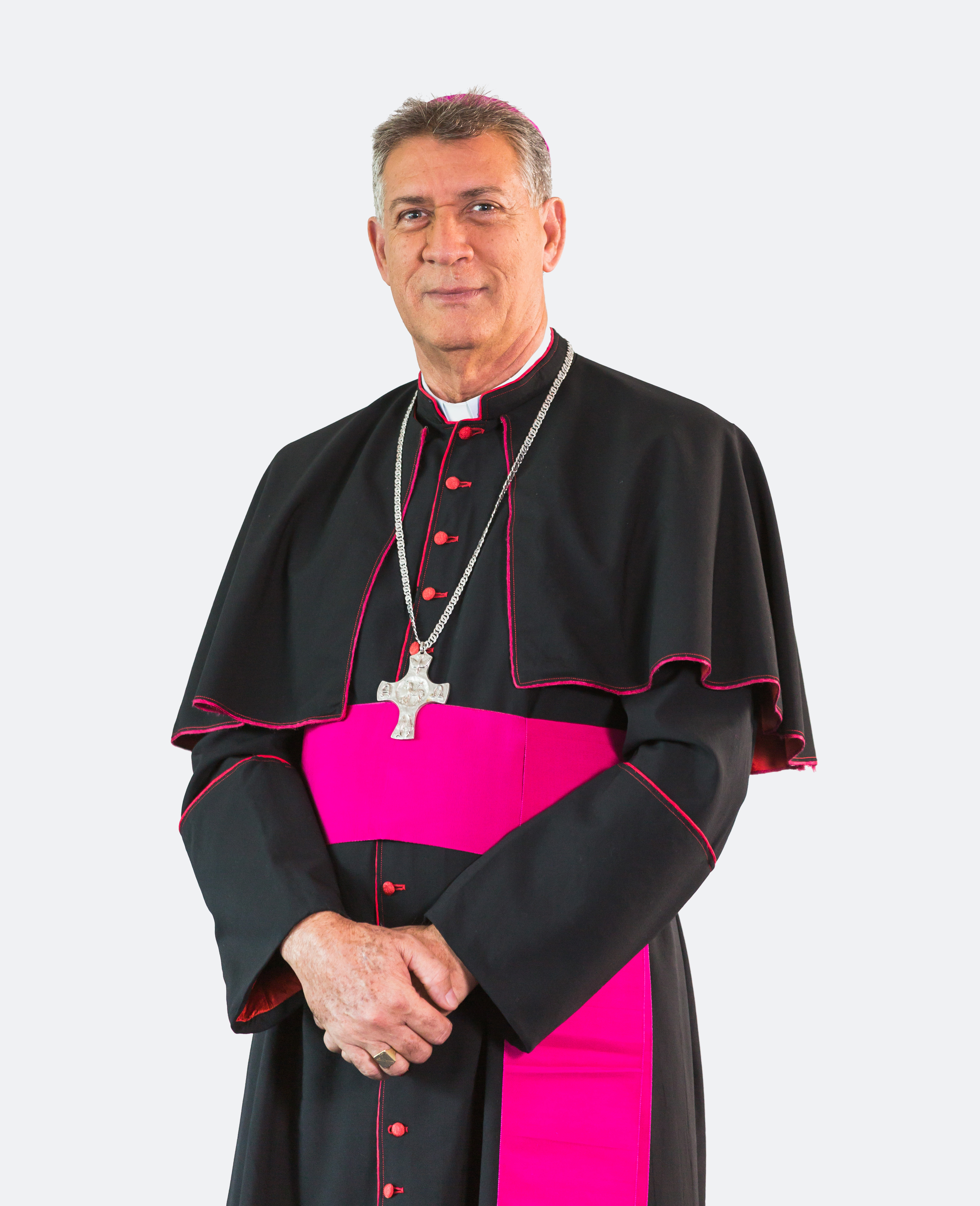 Obispo Diómedes Espinal de León